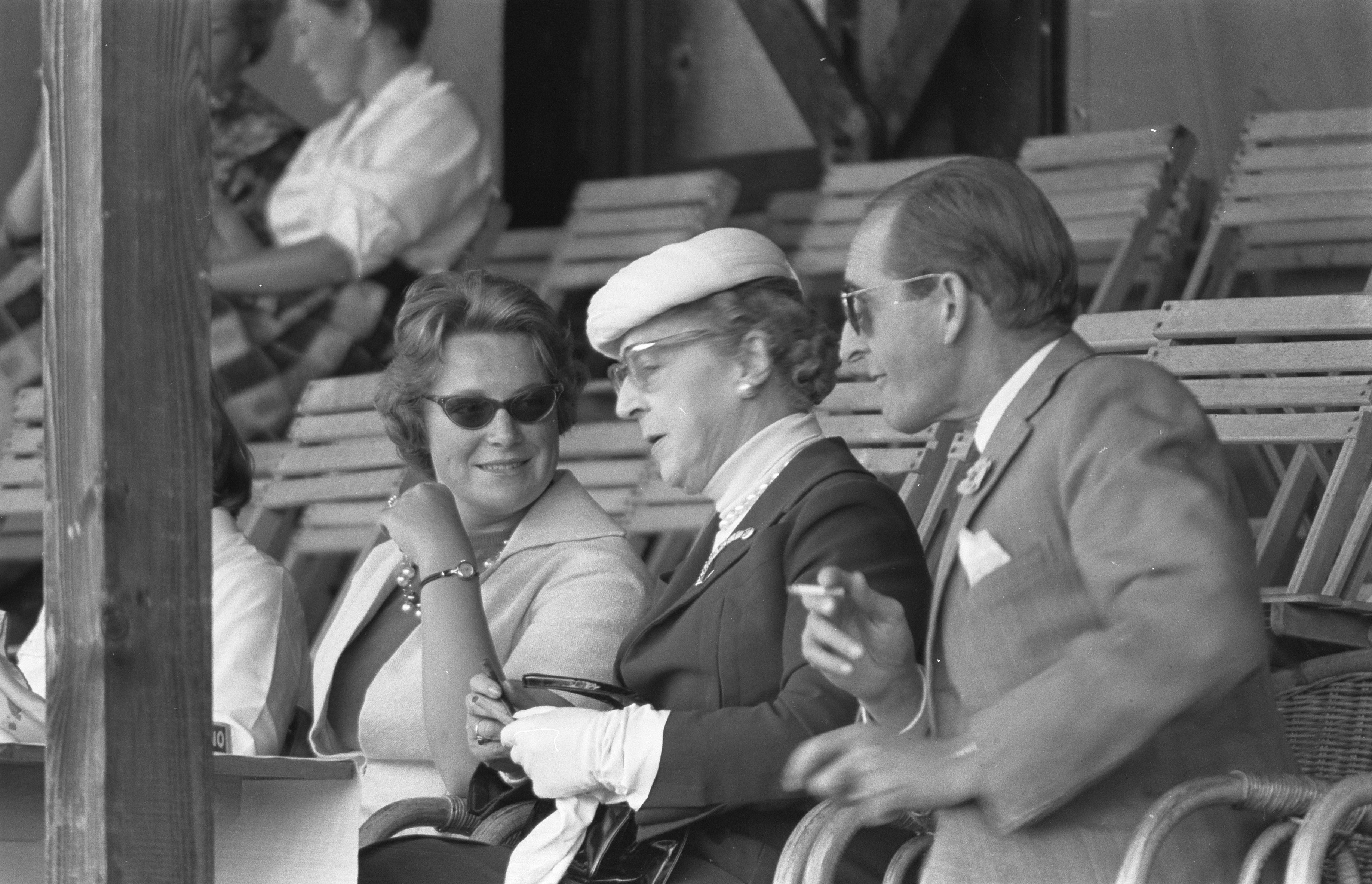 Collectie / Archief : Fotocollectie Anefo Reportage / Serie : [ onbekend ] Beschrijving : CHIO derde dag, Prinses Irene en Prinses Armgard Datum : 3 september 1959 Persoonsnaam : Armgard, prinses van Lippe-Biesterfeld, Irene, prinses Instellingsnaam : CHIO Fotograaf : Pot, Harry / Anefo Auteursrechthebbende : Nationaal Archief Materiaalsoort : Negatief (zwart/wit) Nummer archiefinventaris : bekijk toegang 2.24.01.05 Bestanddeelnummer : 910-6455